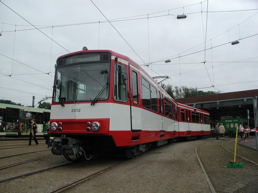 KVB Tw 2012 in Thielenbruch